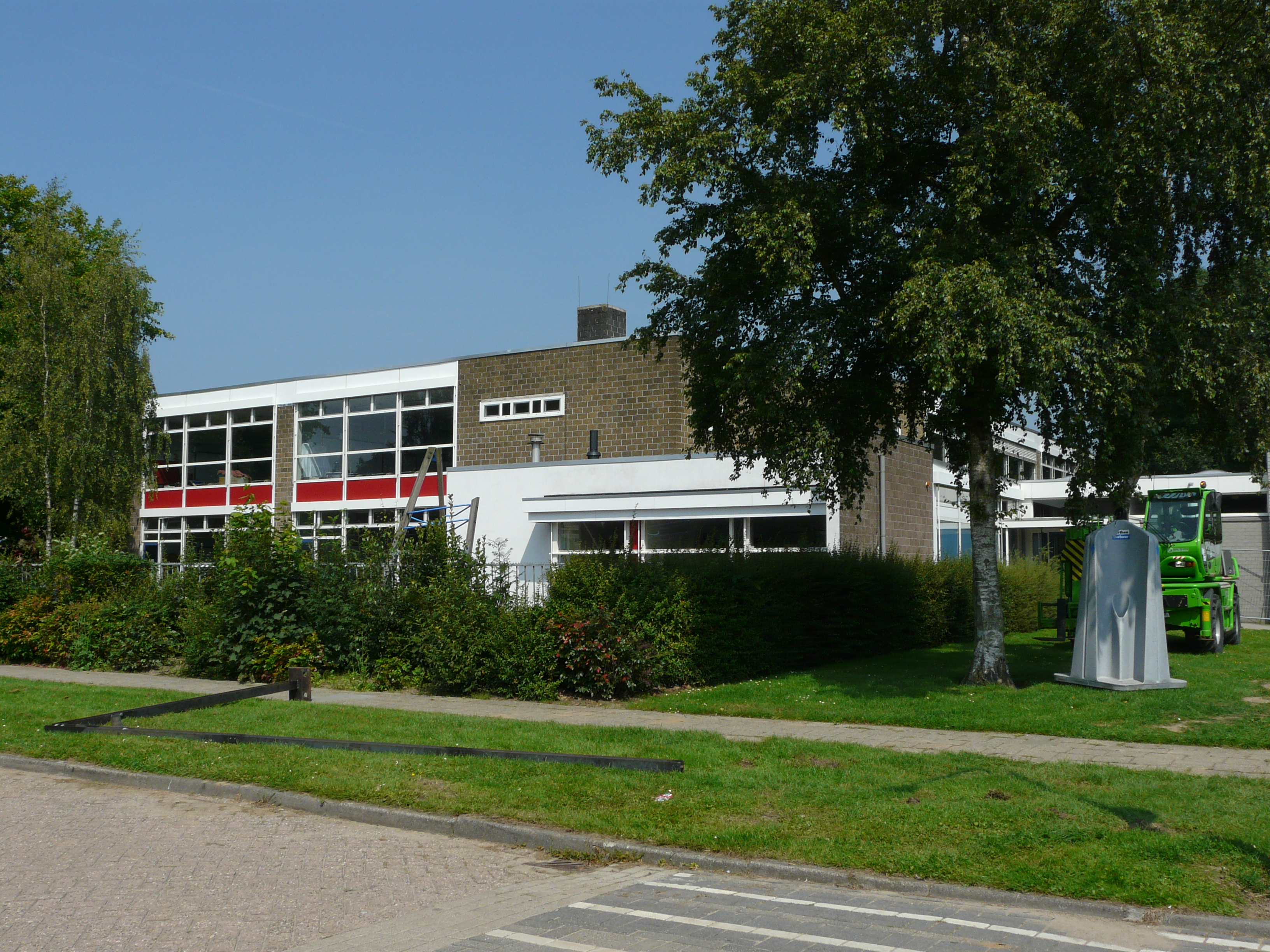 Basisschool d’Uylenborgh in Almkerk